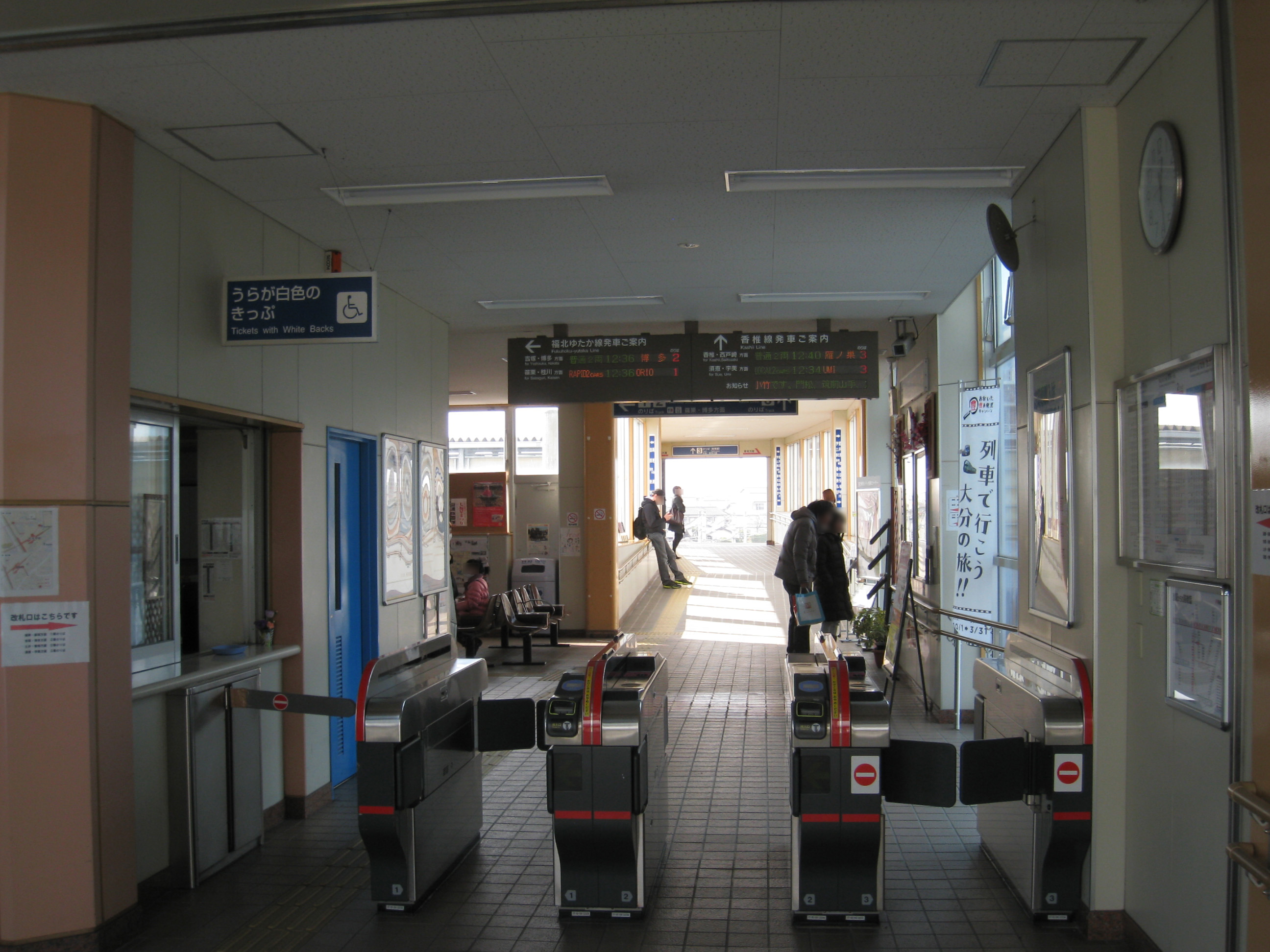 長者原駅 改札口